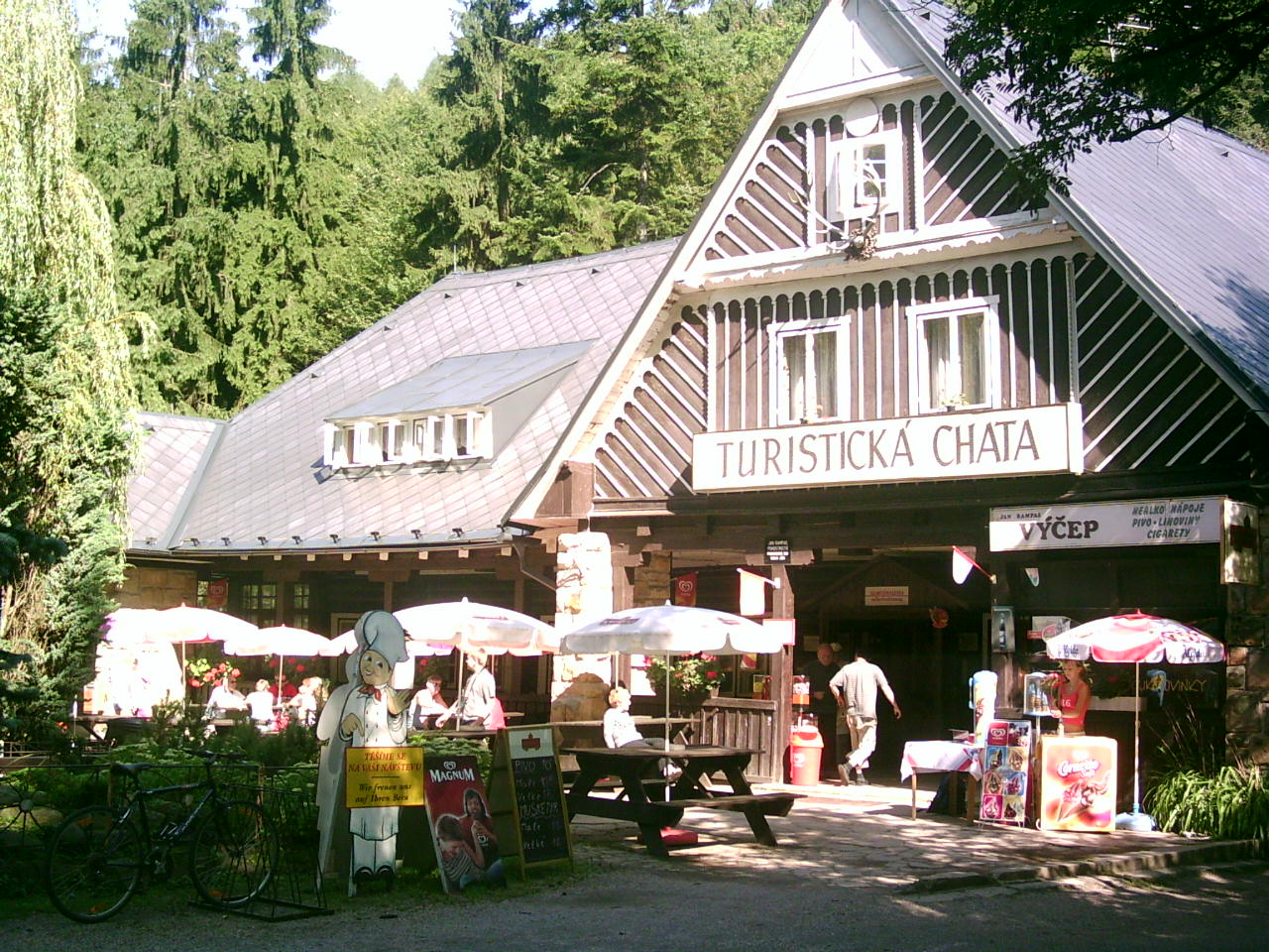 Die Turisticka chata in den Prachauer Felsen. Selbst fotografiert